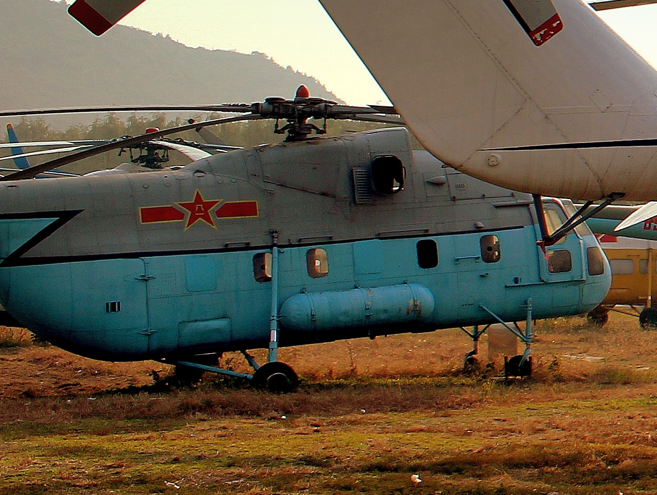 DATANGSHAN CHINA AVIATION MUSEUM BEIJING OCT 2012 6